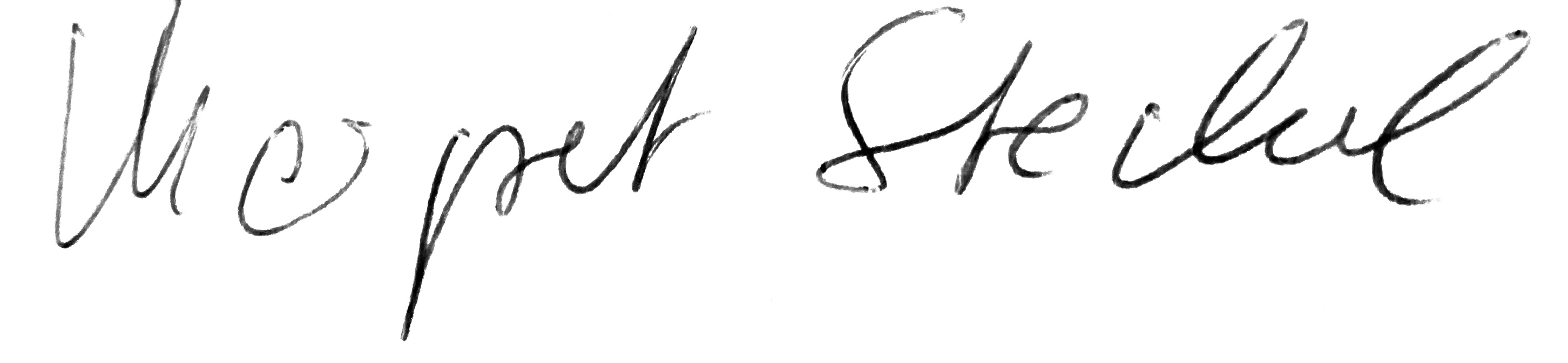 Von Schriftstellerin Margret Steckel persönlich signierte Ausgabe der Novelle "Jette, Jakob und die andern"